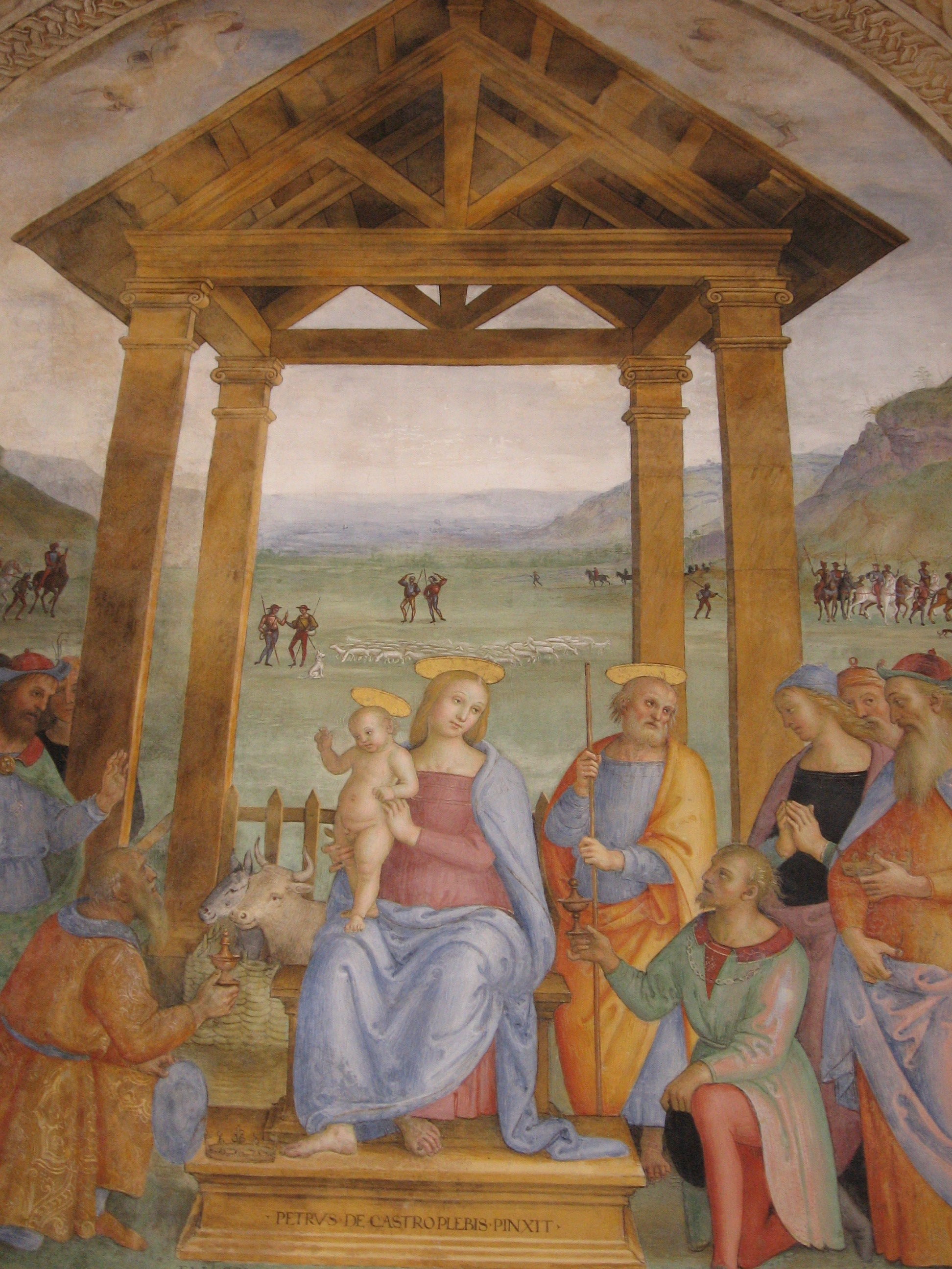 Adoration de mages (Le Pérugin), Trevi